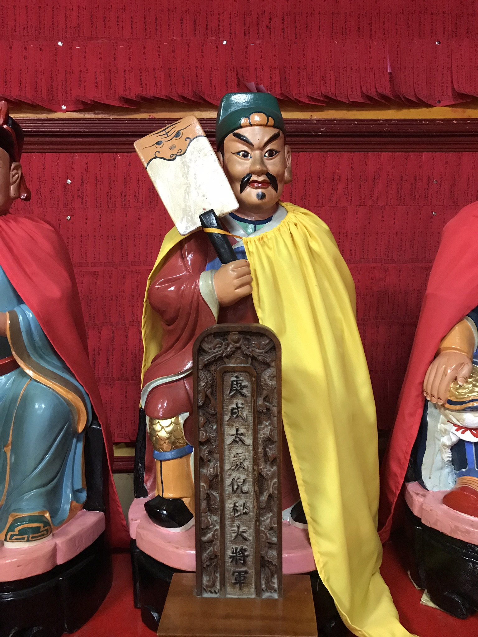 麻豆代天府庚戌太歲倪秘大將軍神像